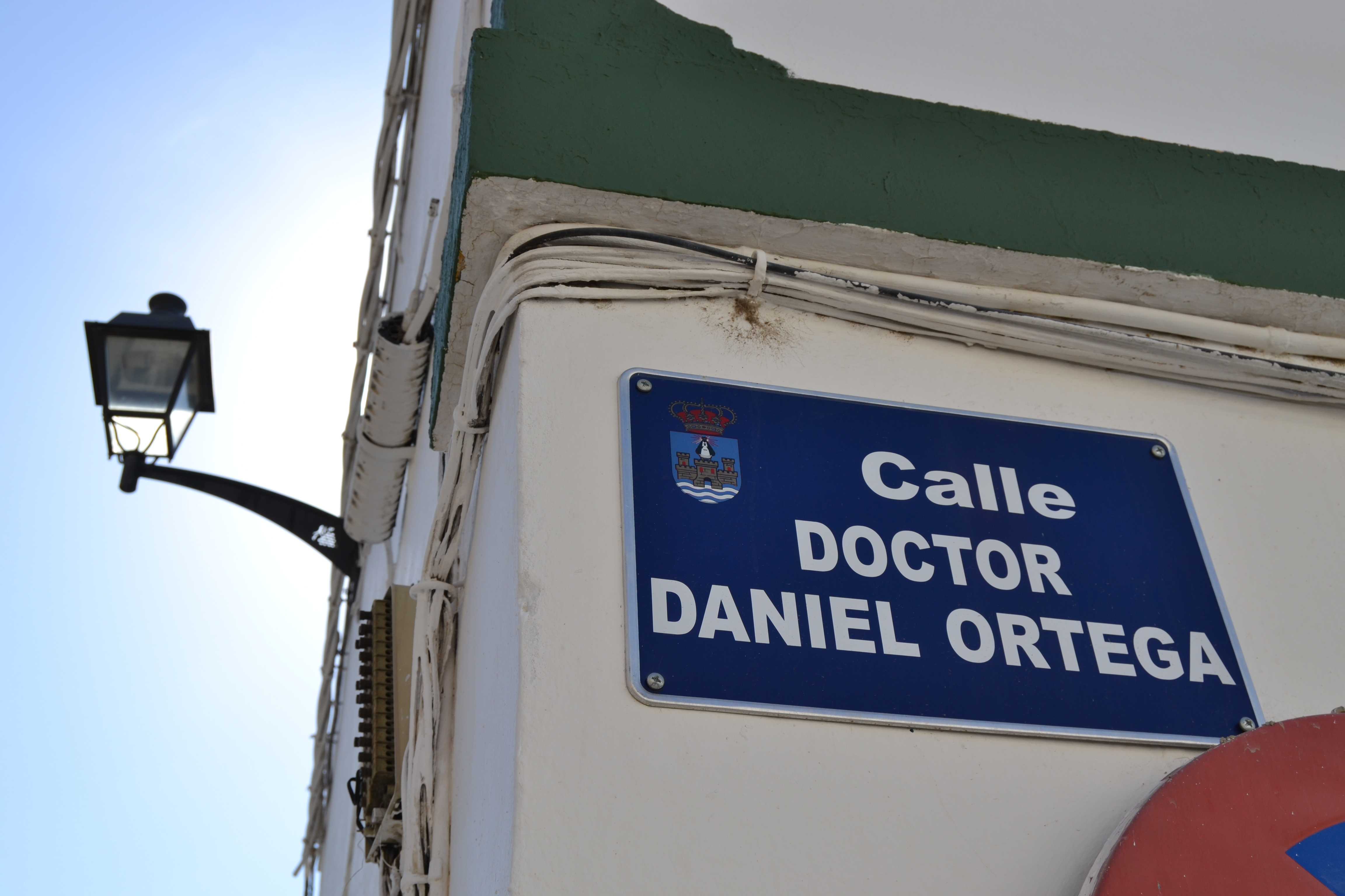 Calle Doctor Daniel Ortega, El Puerto de Santa María